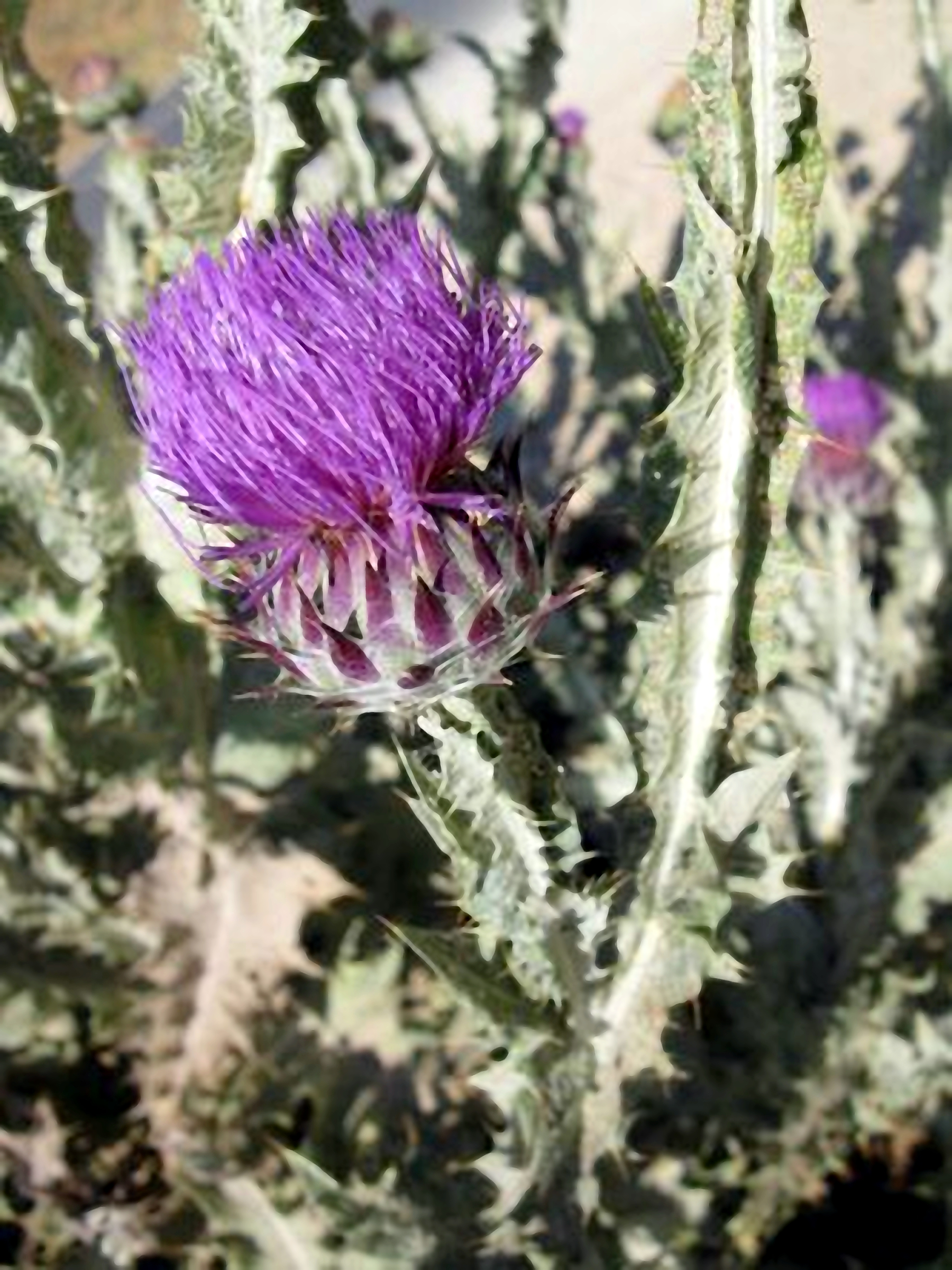 Onopordum platylepis - Circa Ichkeul (Marruecos).